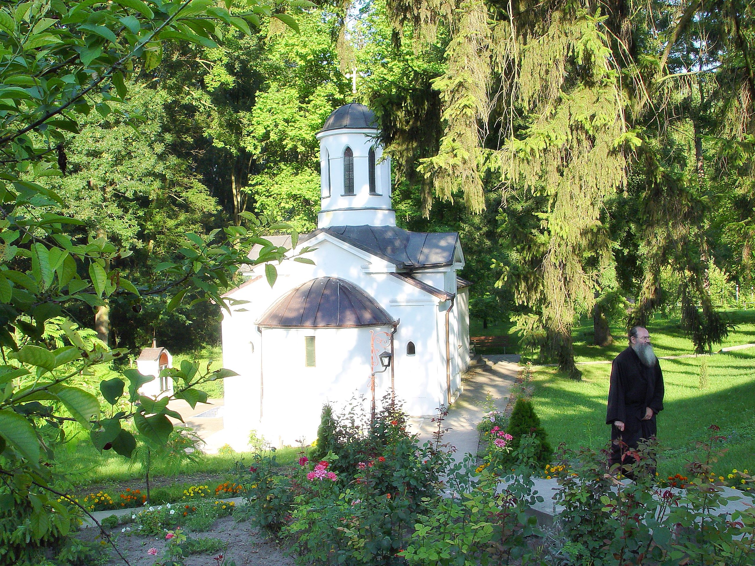 Manastir Bavanište kod Kovina (muški manastir)